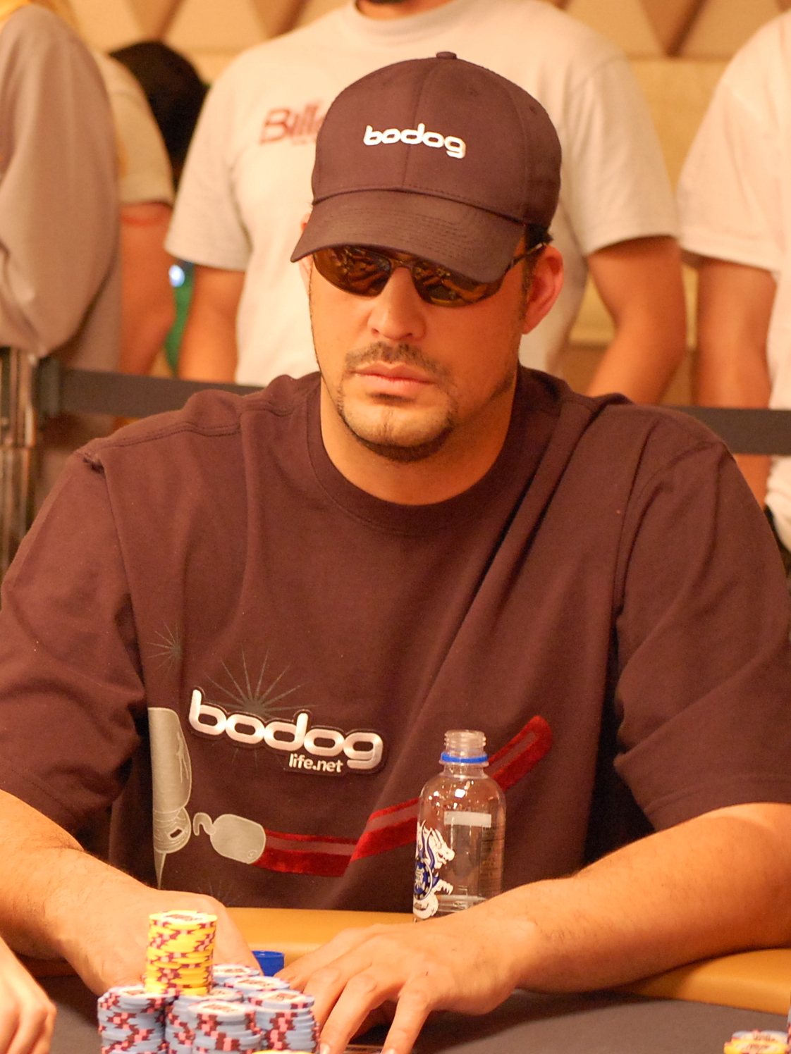 Jean-Robert Bellande bei der World Series of Poker 2008